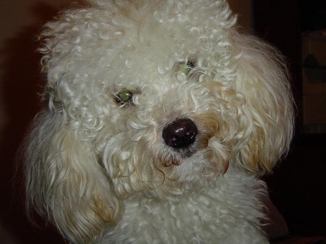 Cachorro da raça Poodle